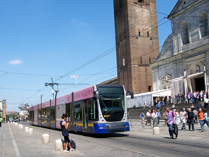 Torino - Tram in Piazza S. Giovanni